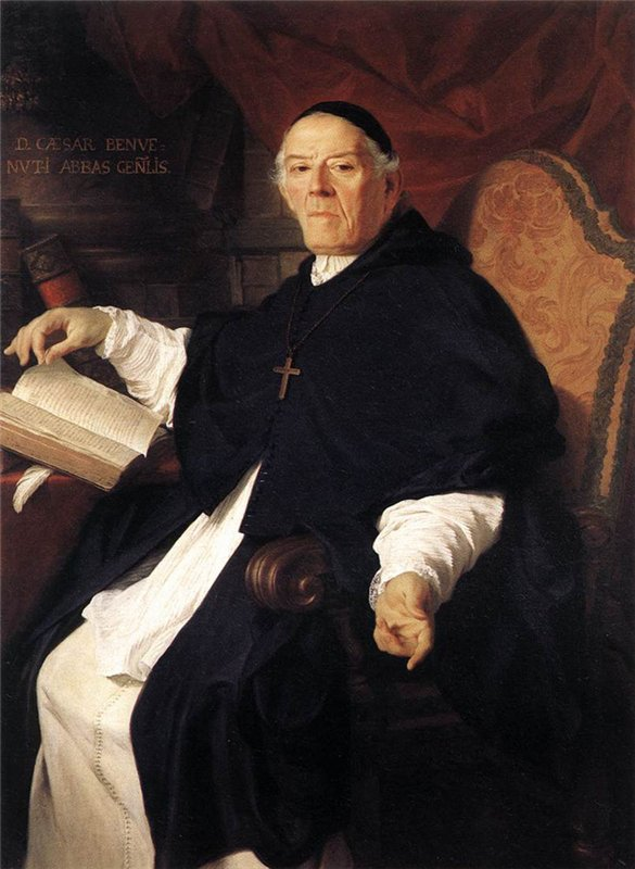 Don Cesare Benvenuti